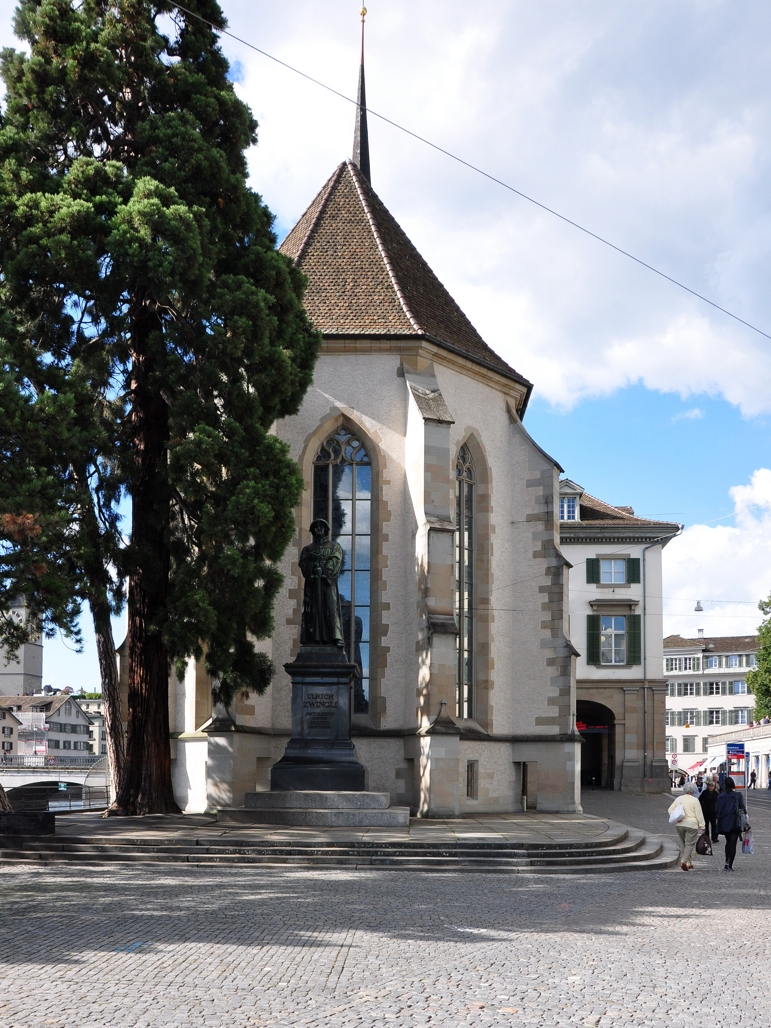 Wasserkirche and Helmhaus in Zürich (Switzerland) as seen from Limmatquai(Switzerland)